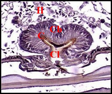 Coupe histologique de la glande rostrale d' Argyroneta aquatica